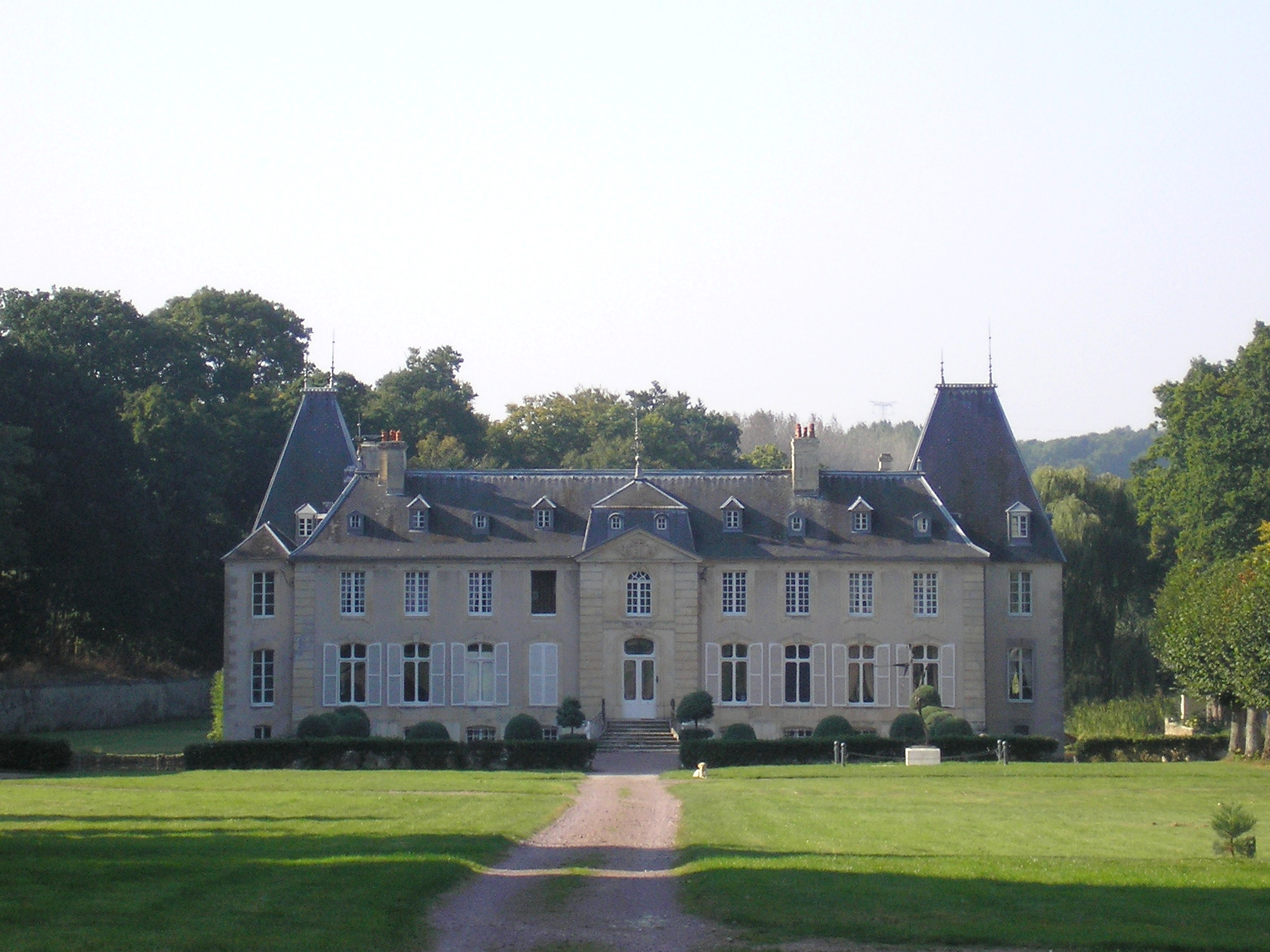 Bougy (Normandie, France). Le château.